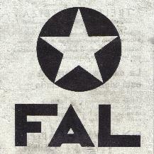 Logo usado las FAL, en especial en sus comunicados